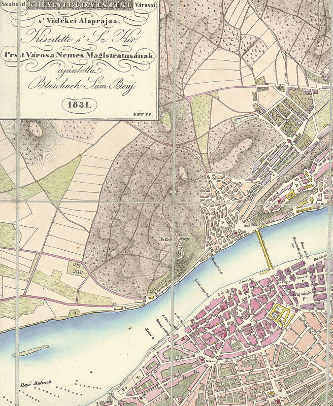 Szabad királyi Buda és Pest Városai s’ Vidékei Alaprajza. Készitette s’ Sz: Kir: Pest Városa Nemes Magistratusának ajánlotta Blaschnek Sám(uel) Benj(ámin). 1831. Gyönyörűen színezett, kőnyomatú térkép, kétoldalt részletes leírással (statisztikai adatok, fontosabb utcák, híresebb középületek, templomok, patikák, stb.) németül jelent meg először, egy évvel korábban. Az első magyar kiadást 1832-re teszi, amelyet 1835-ben egy újabb követett.